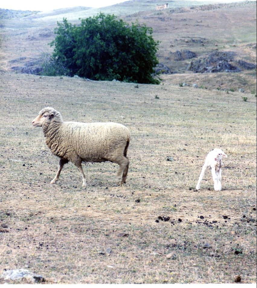 Oveja merina y cordero recién nacido